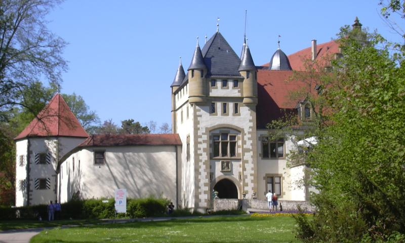 Götzenburg in Jagsthausen